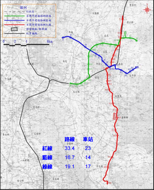 1997年，臺灣省政府完成「臺中都會區捷運路網細部規劃」，規劃有紅、藍、綠三條路線。